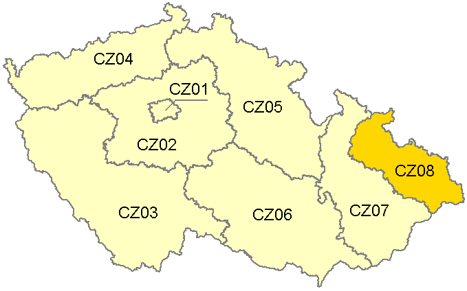 Mapa NUTS CZ08, jedné z osmi NUTS2 oblastí ČR